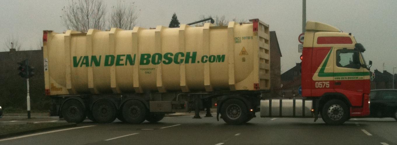 Van den Bosch Transporte, eine niederländische Spedition